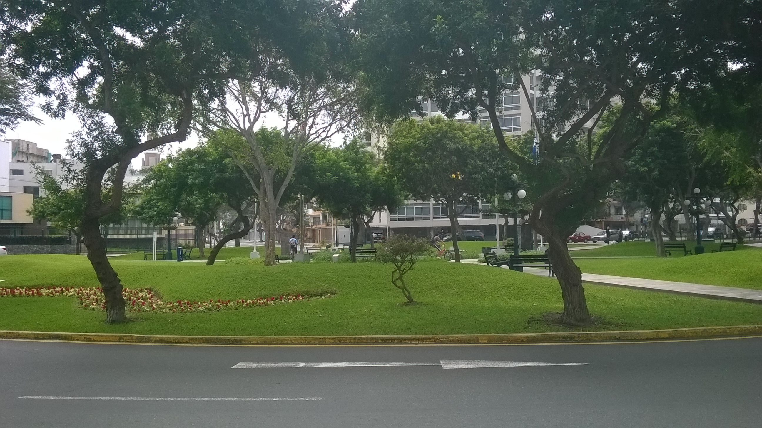 Plaza Centroamérica en el distrito de Miraflores.